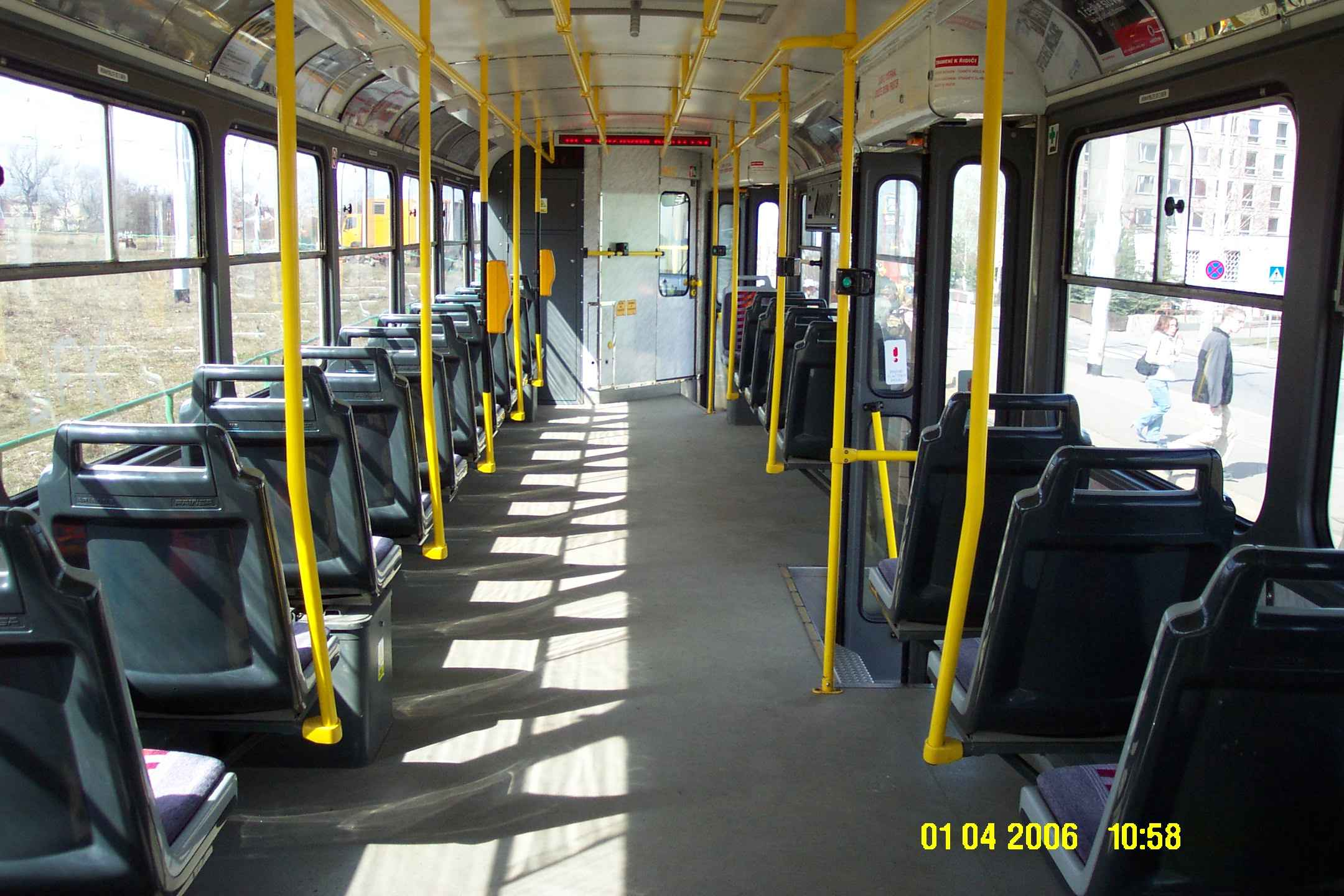 Interiér tramvaje typu T3P